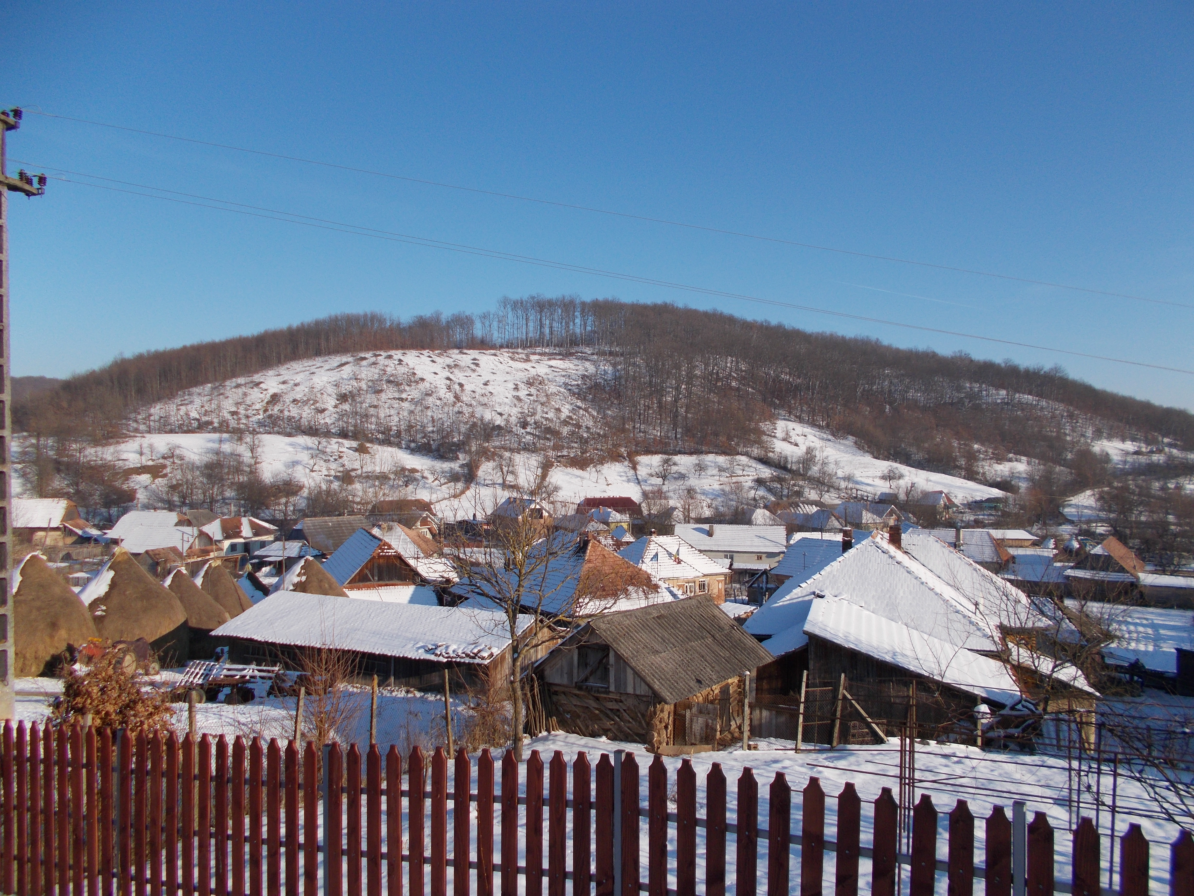 Satul Fildu de Sus, județul Sălaj